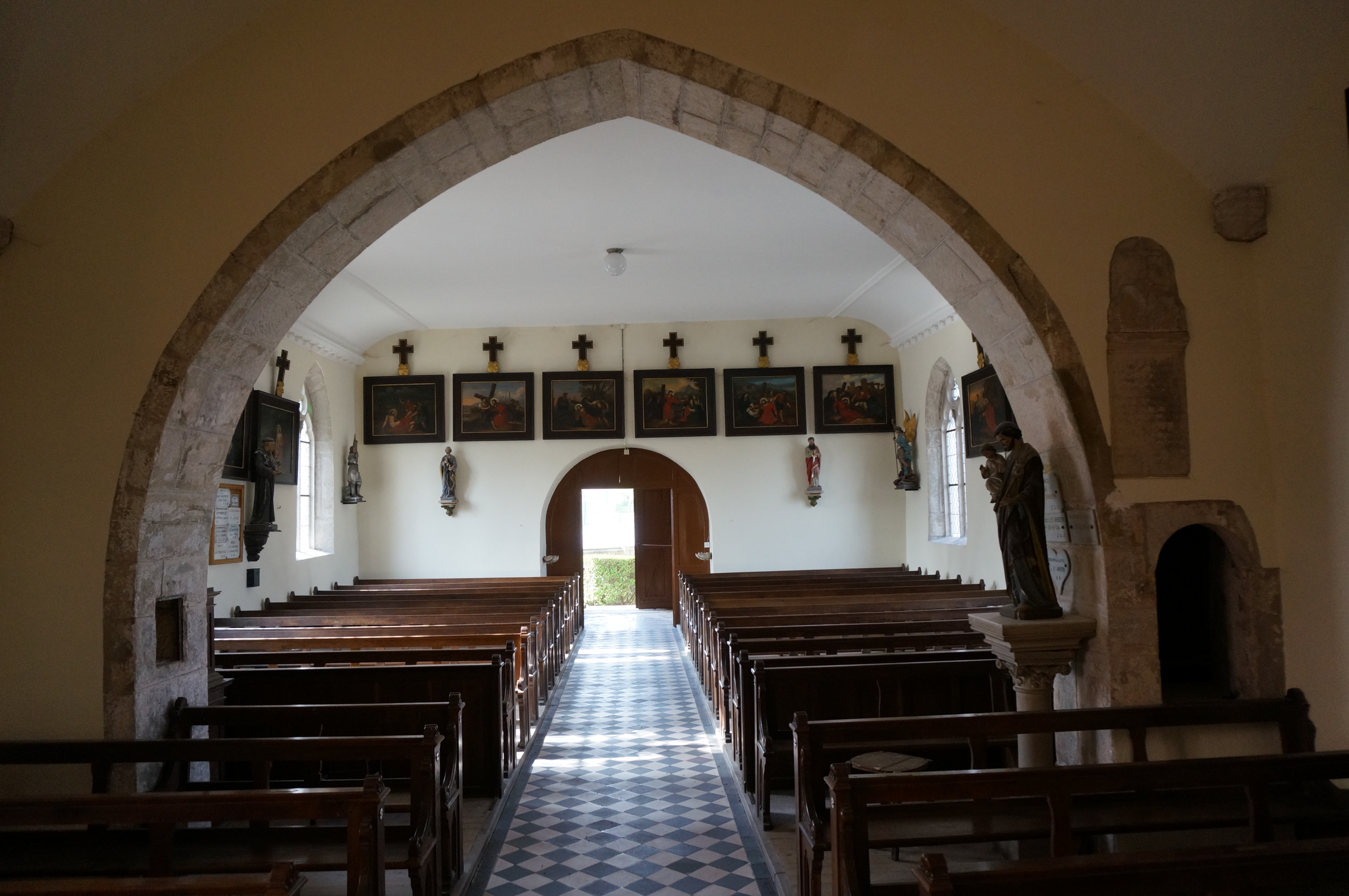 Vues de la Chapelle Notre-Dame de Grâce.